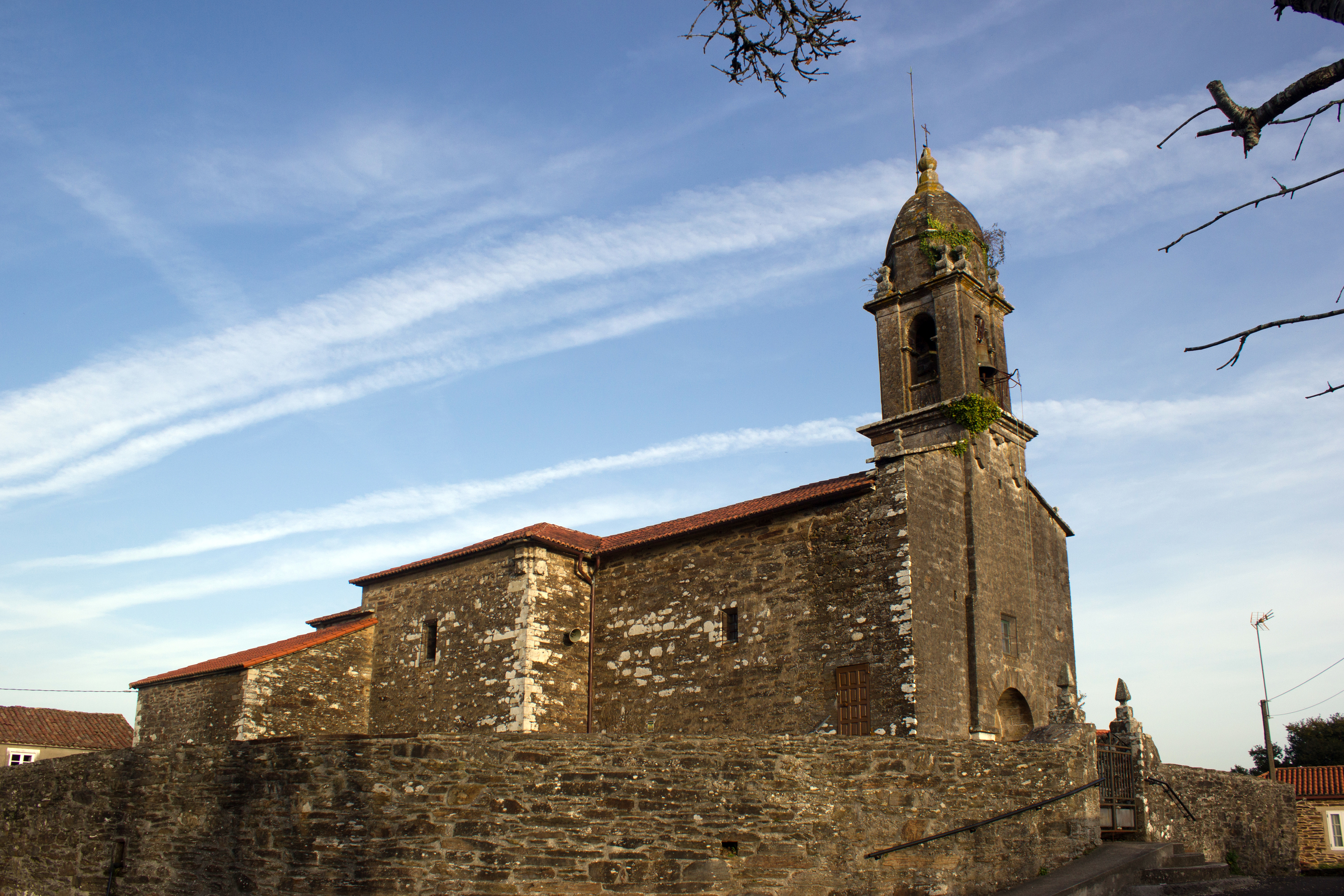 Igrexa de San Fiz de Quión, no concello de Touro.